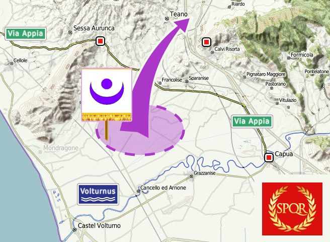 Schema der Einkesselung Hannibals im Falernischen Feld (Ager Falernus) Römische Truppen Karthagische Truppen